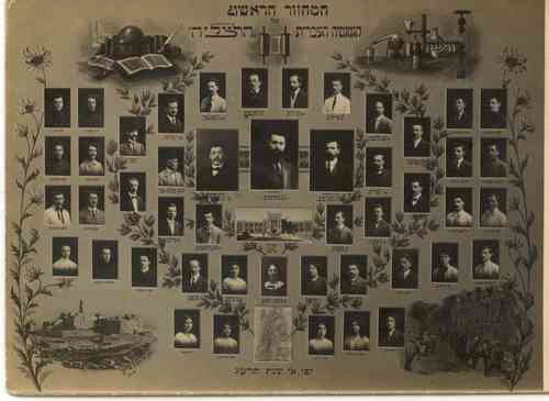 המחזור הראשון של גימנסיה הרצליה Gymnasium First Class, with teachers תלמידי ומורי המחזור הראשון תל אביב 04 גימנסיה הרצליה 4